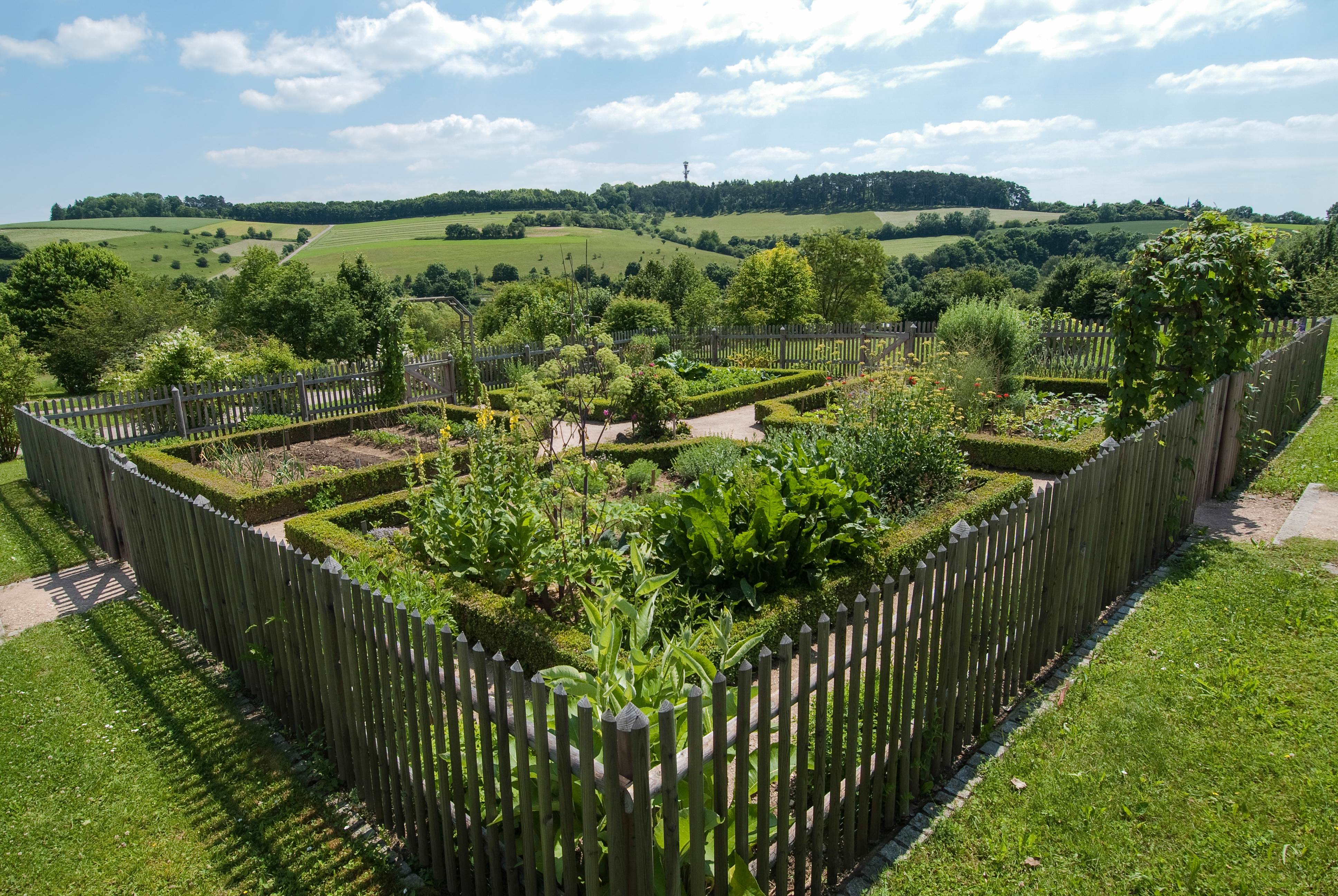 Bauerngarten im Botanischen Garten der Universität Ulm